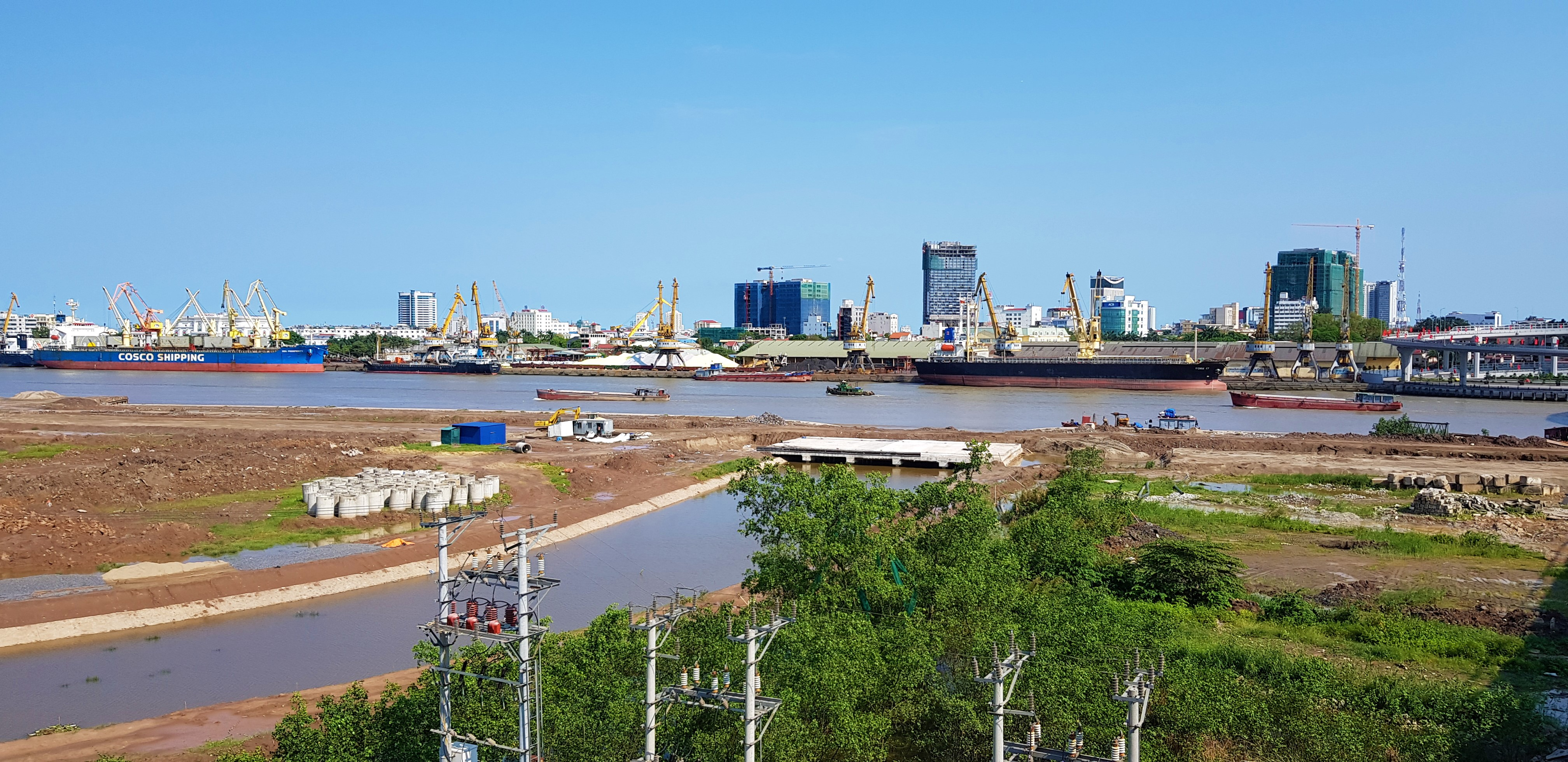 Thành Phố Hải Phòng 2020 bên bờ Sông Cấm